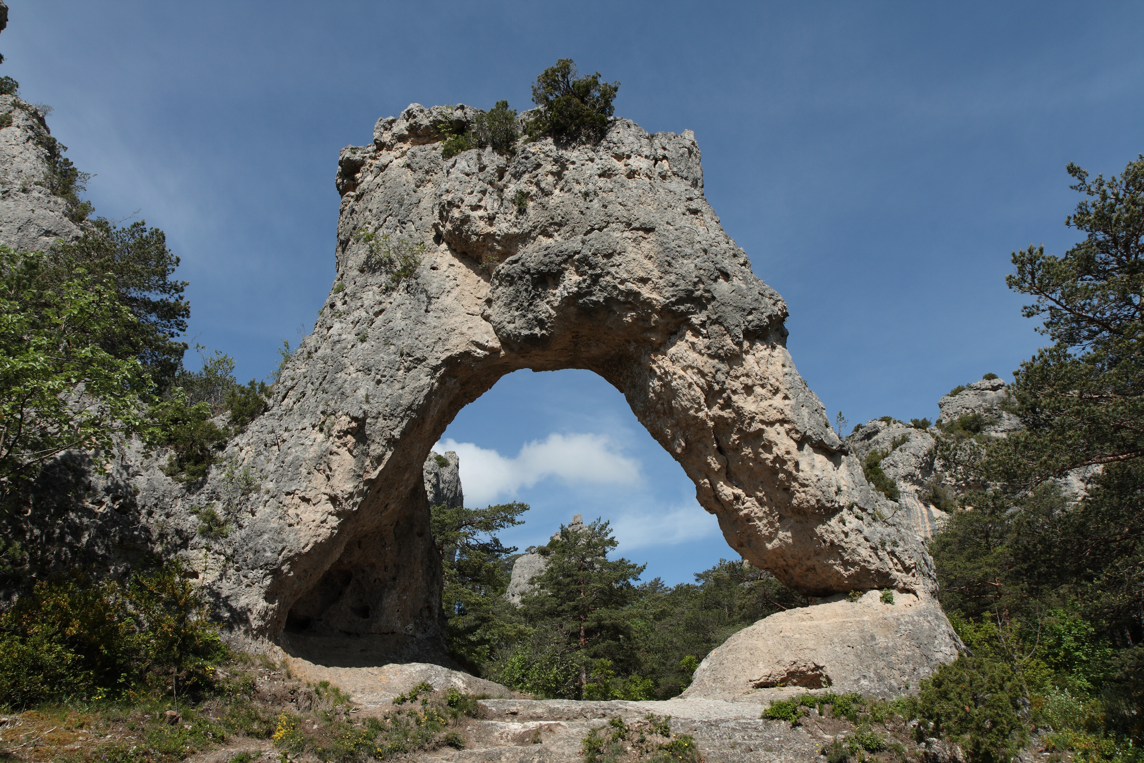 Porte de Mycène, dans le chaos de Montpellier-le-Vieux, La Roque-Sainte-Marguerite (Aveyron, France).